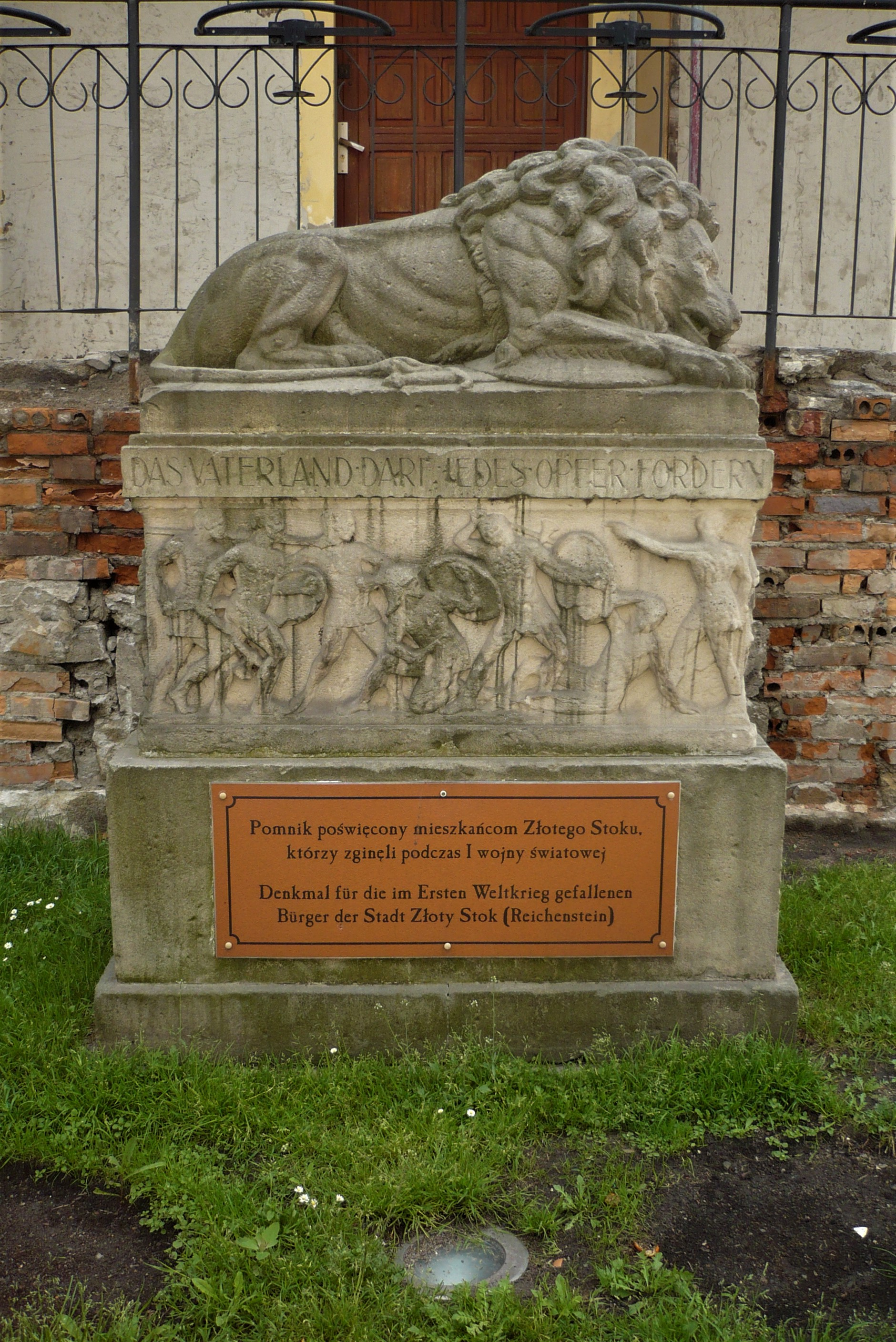 Złoty Stok